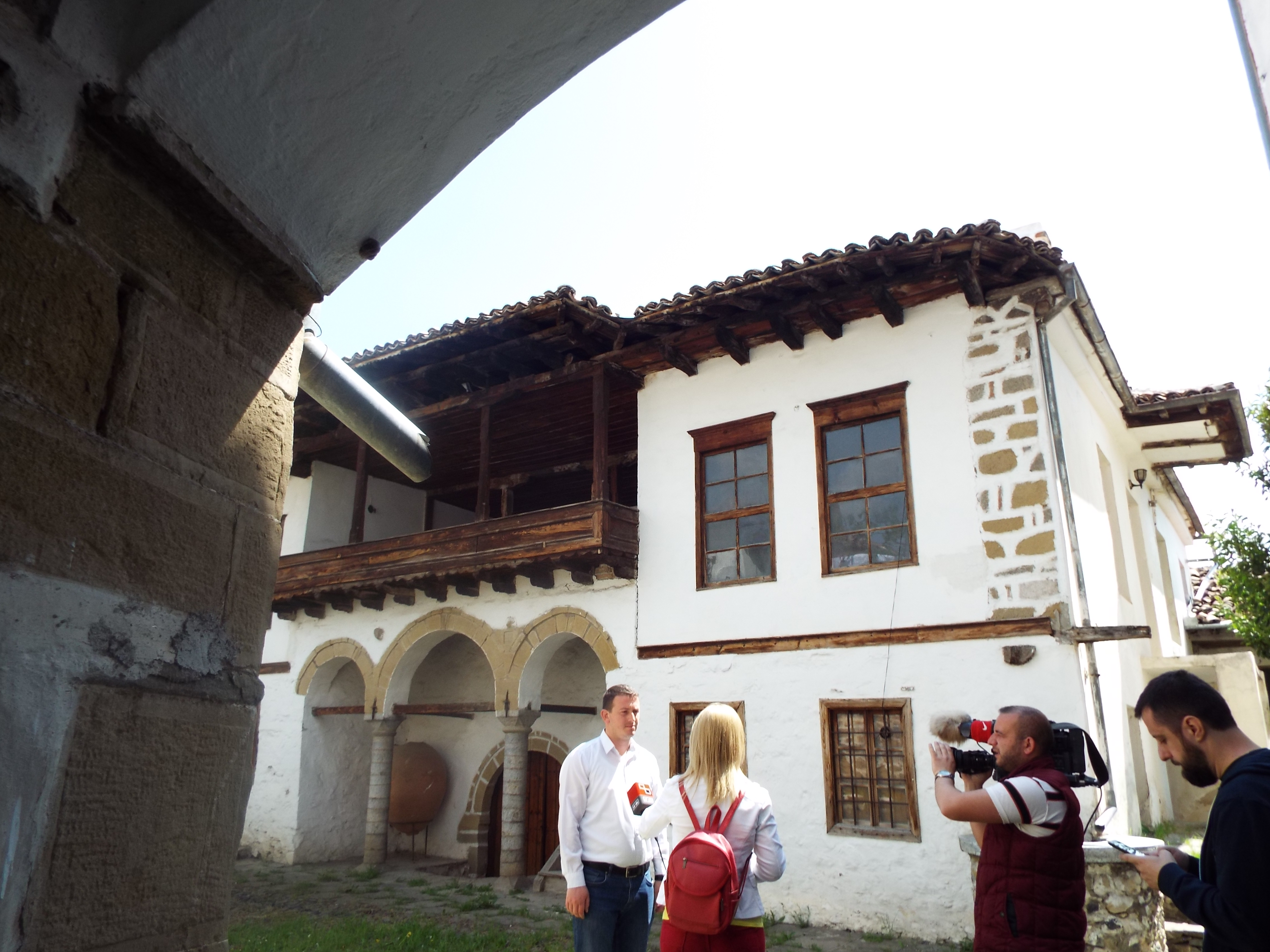 Momente nga hackathon i Code4Culture në qytetin e Korçës.